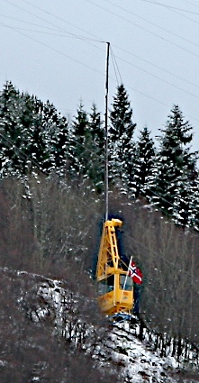 Ulriksbanen i Bergen